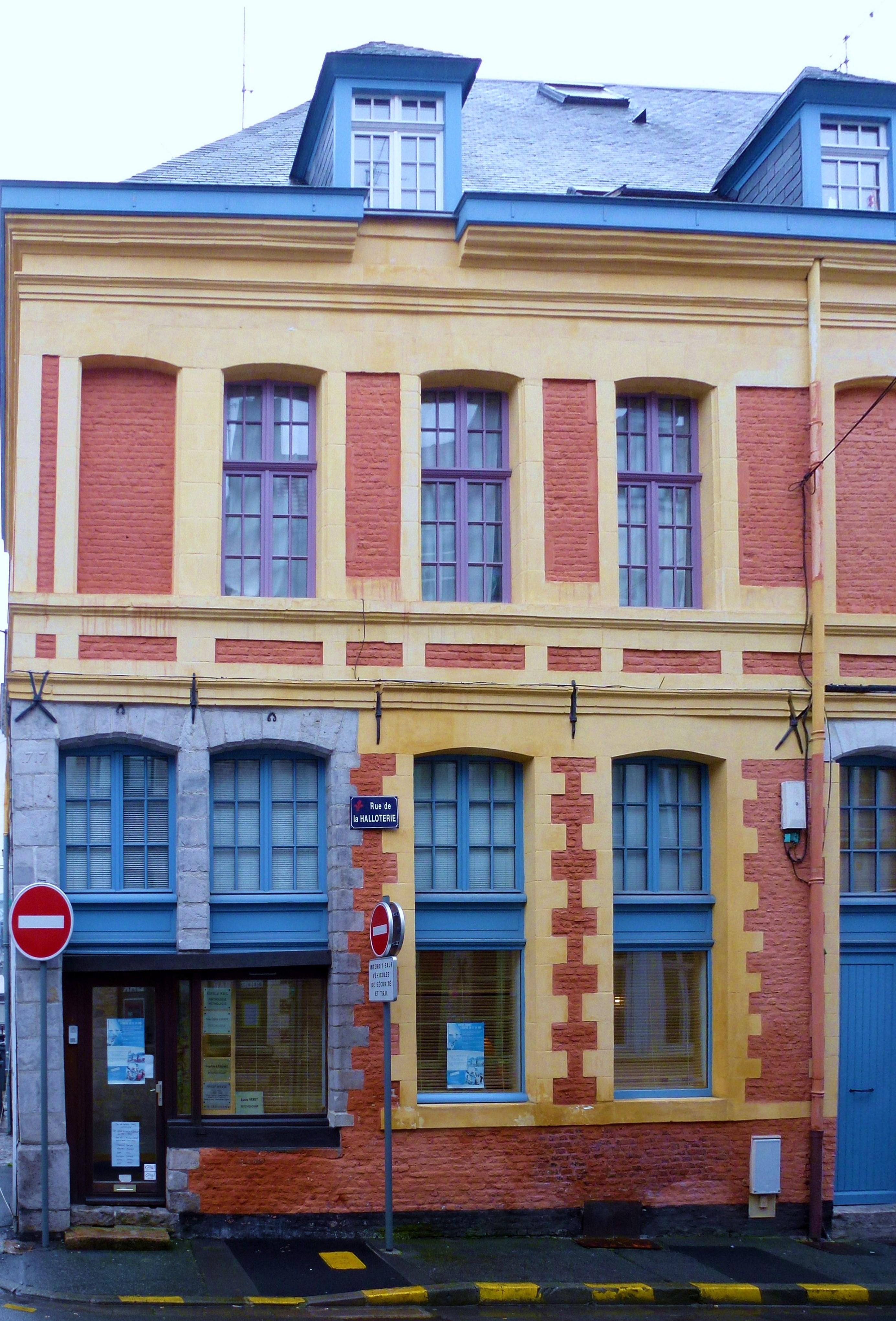 1, 1bis rue de la Halloterie, Lille Nord (département français) .